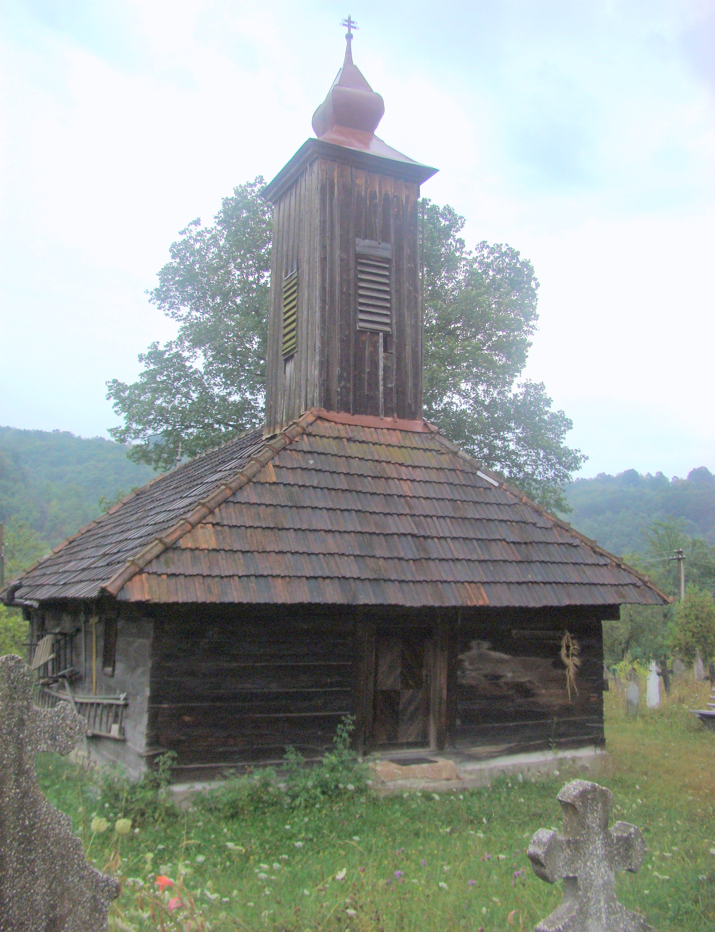 Biserica de lemn din Corbești-Arad